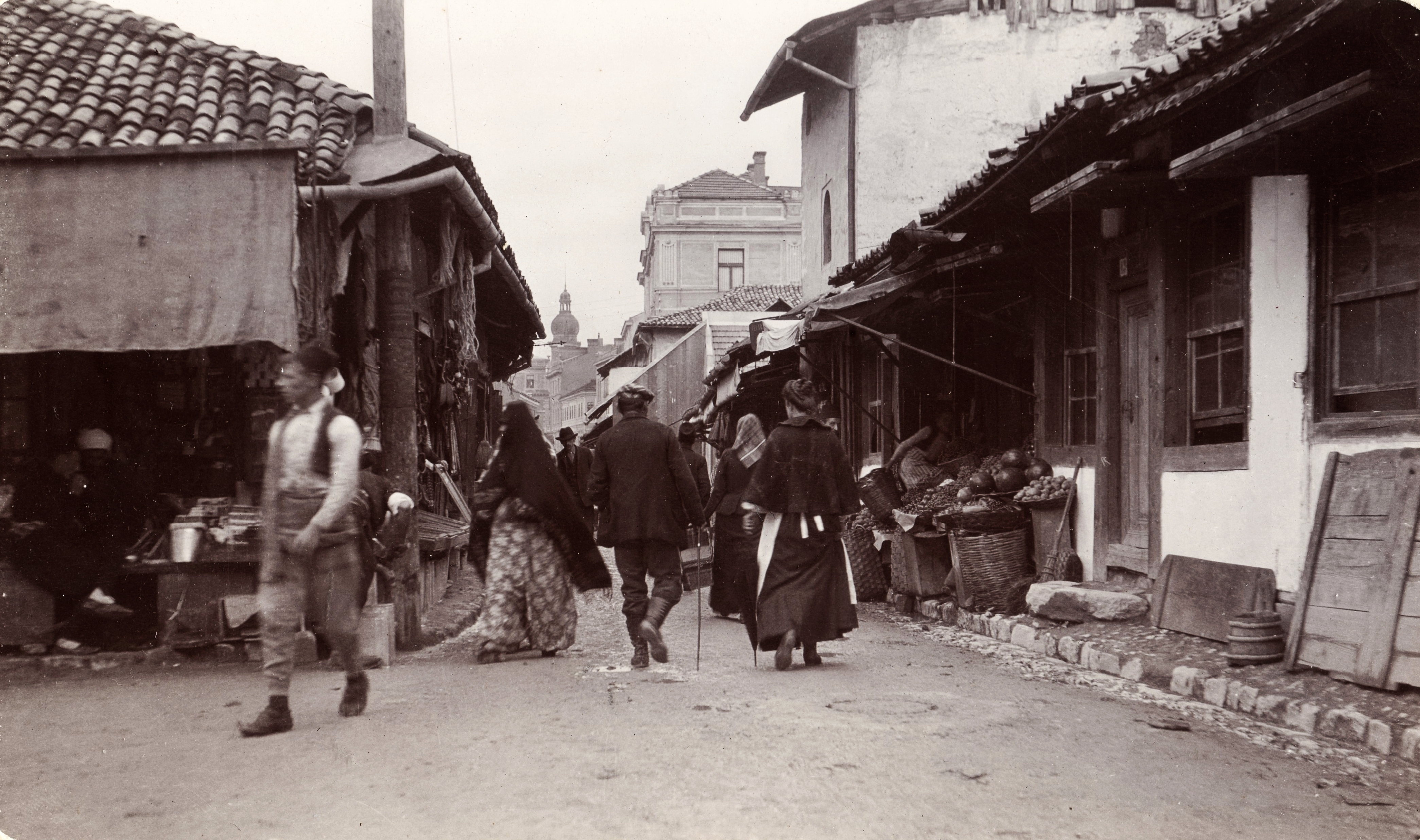 Bascarsija. Location: Bosnia and Herzegovina, Sarajevo Tags: street view, genre painting, bazaar, burqa Title: Bascarsija.